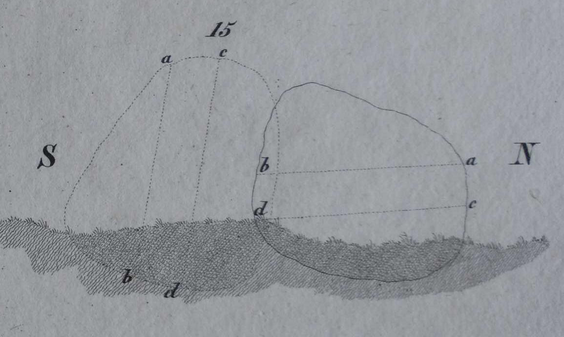 Granitschale vor dem Lustgarten